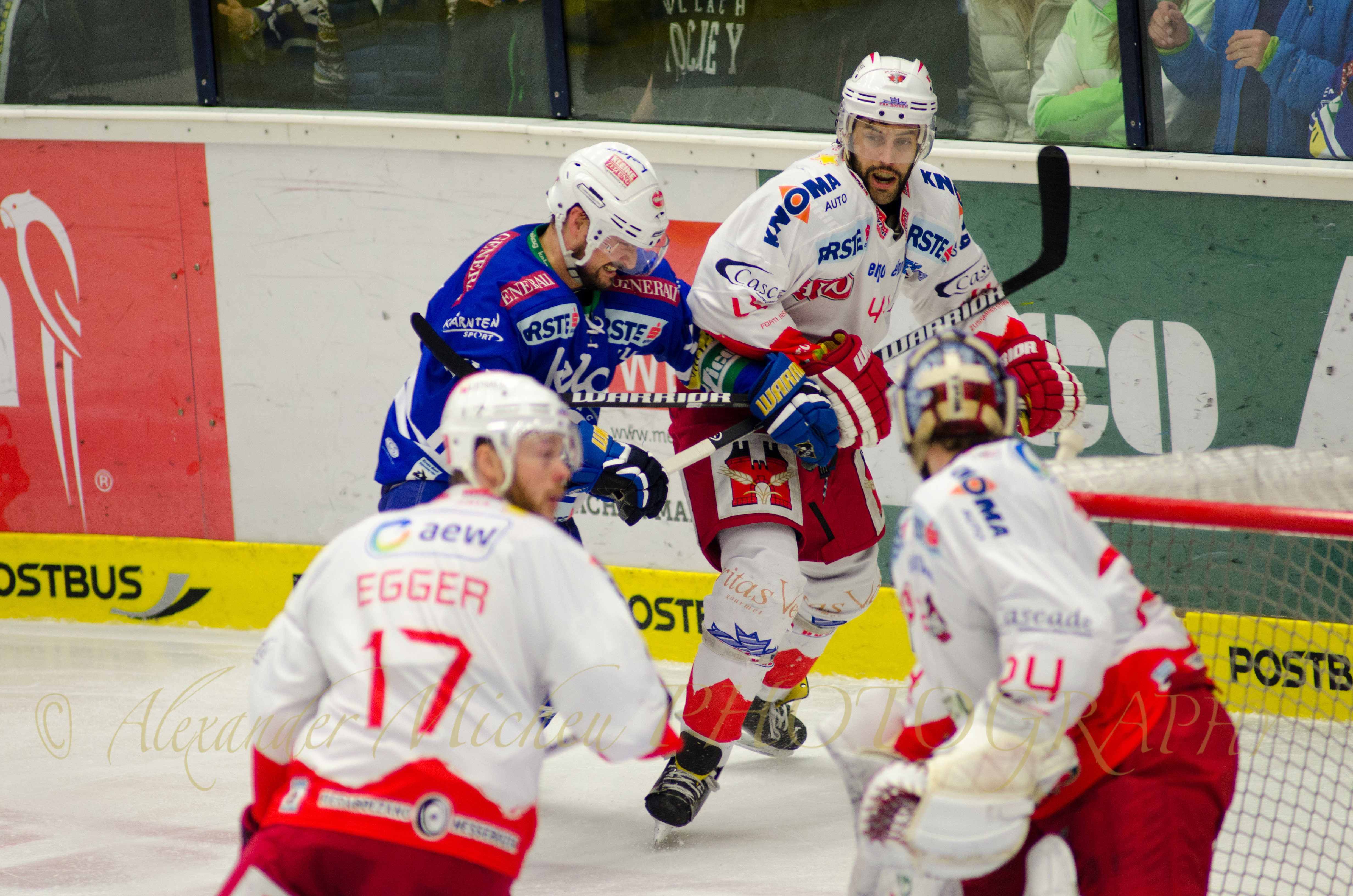 hockey pictures-micheu-EC VSV vs HCB Südtirol 03252014 (149 von 180)